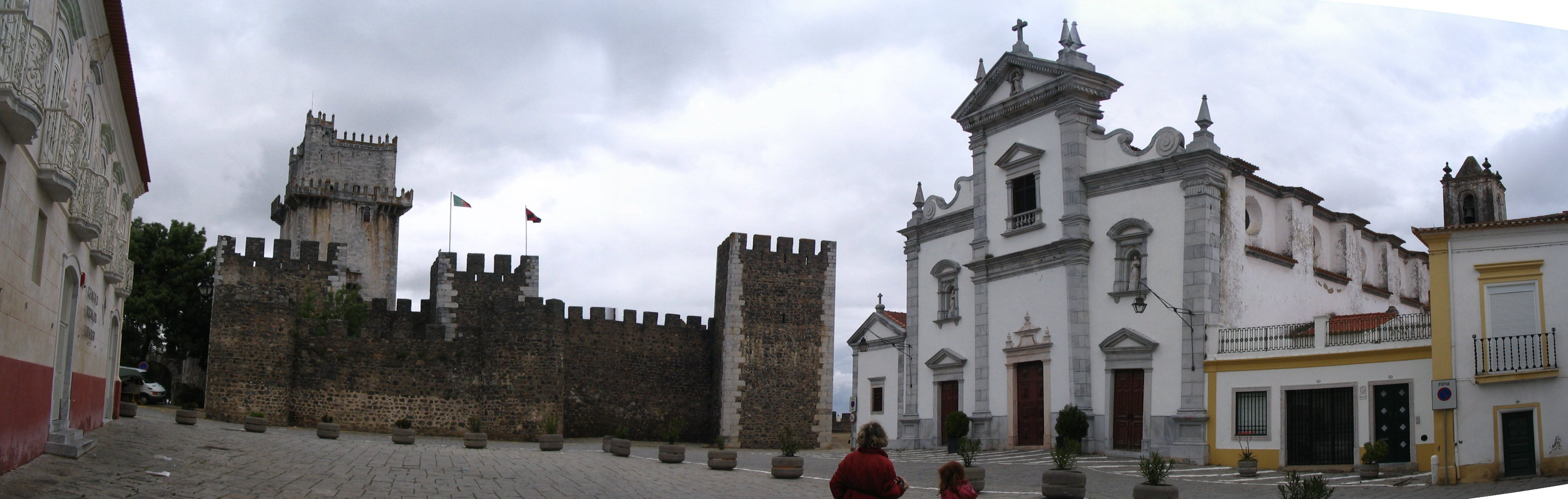 Beja (portugal) - Cathedrale et Chateau de Beja